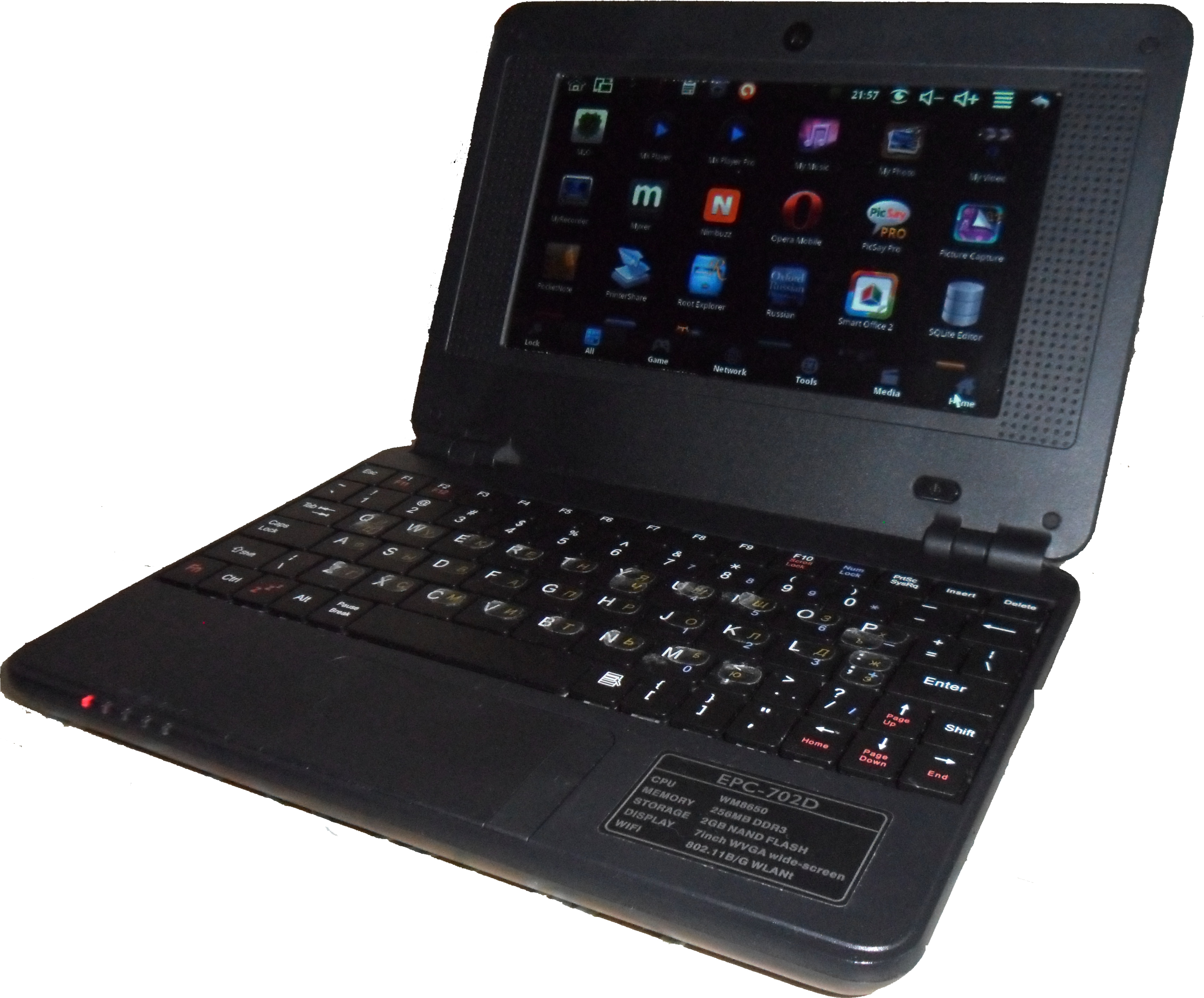 Китайский 7" смартбук второго поколения.